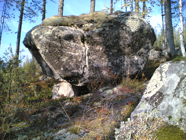 Nurmeksen Pyssyvaaran rinteellä itse otettu valokuva siirtolohkareesta, jossa näyttää olevan kasvot. En tiedä, onko kivi ollut seita.